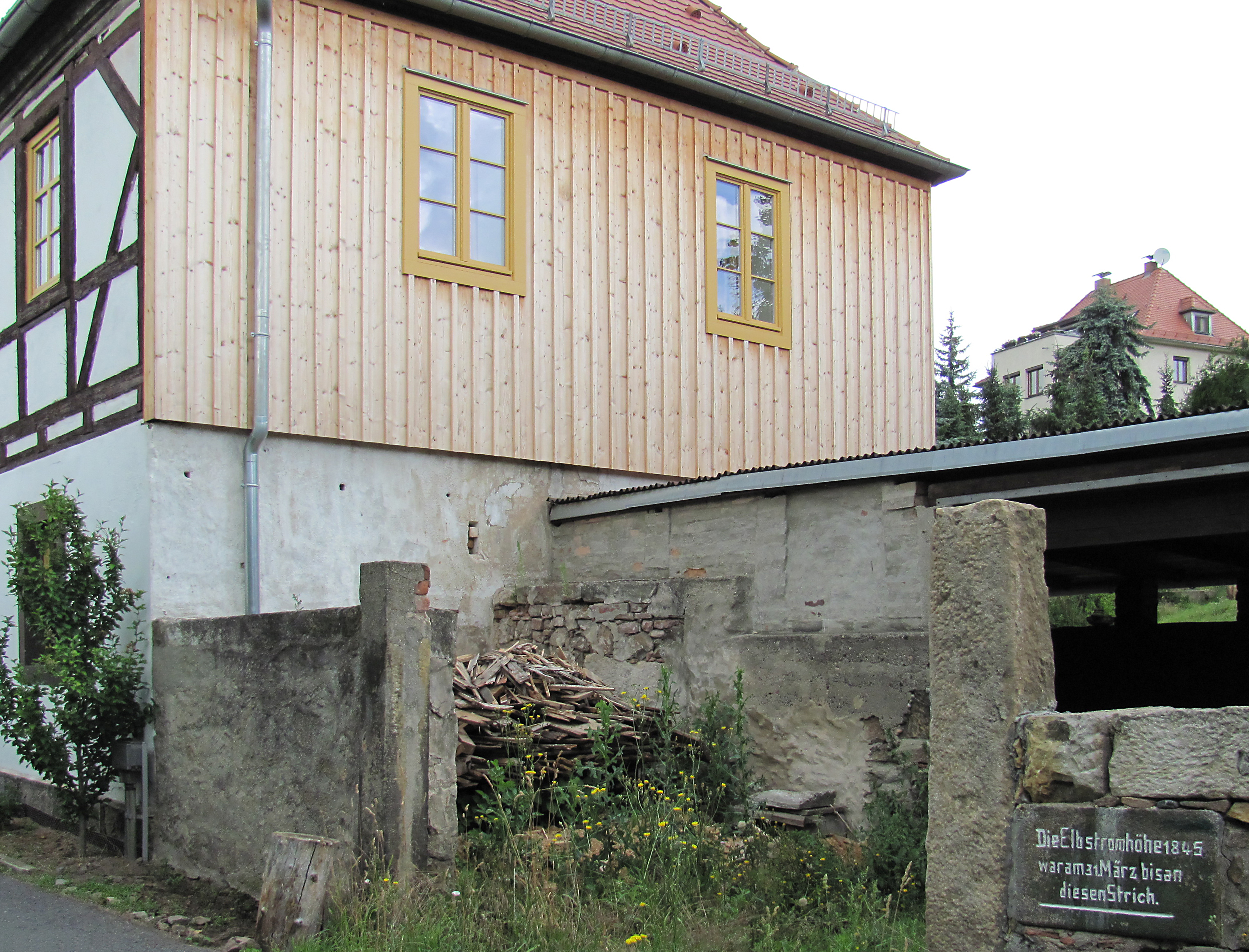 Radebeul, Winzerhaus Bischofsweg 30 (Radebeul) mit Hochwasserschild